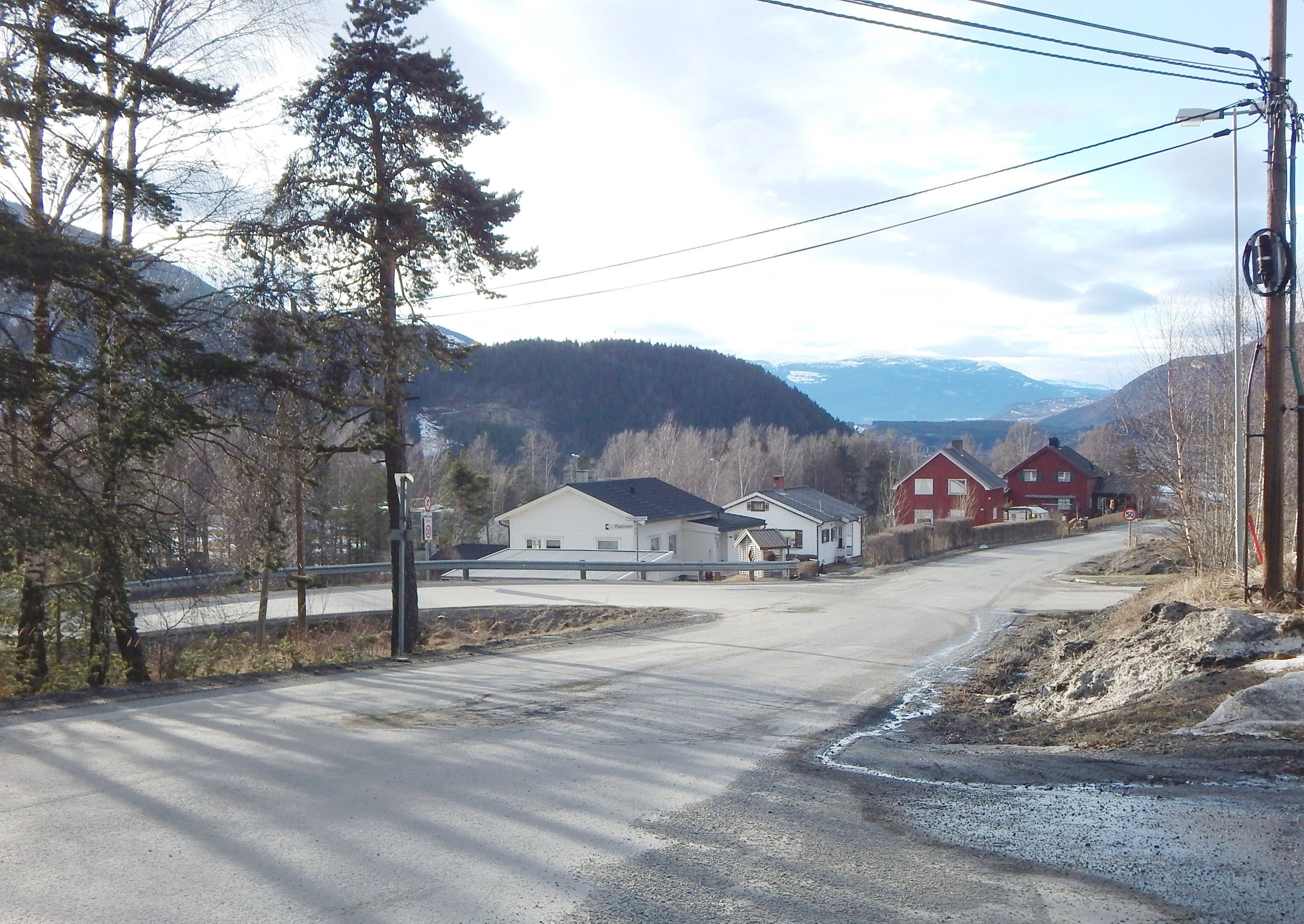 Meierivegen (fylkesvei 403) på Hundorp